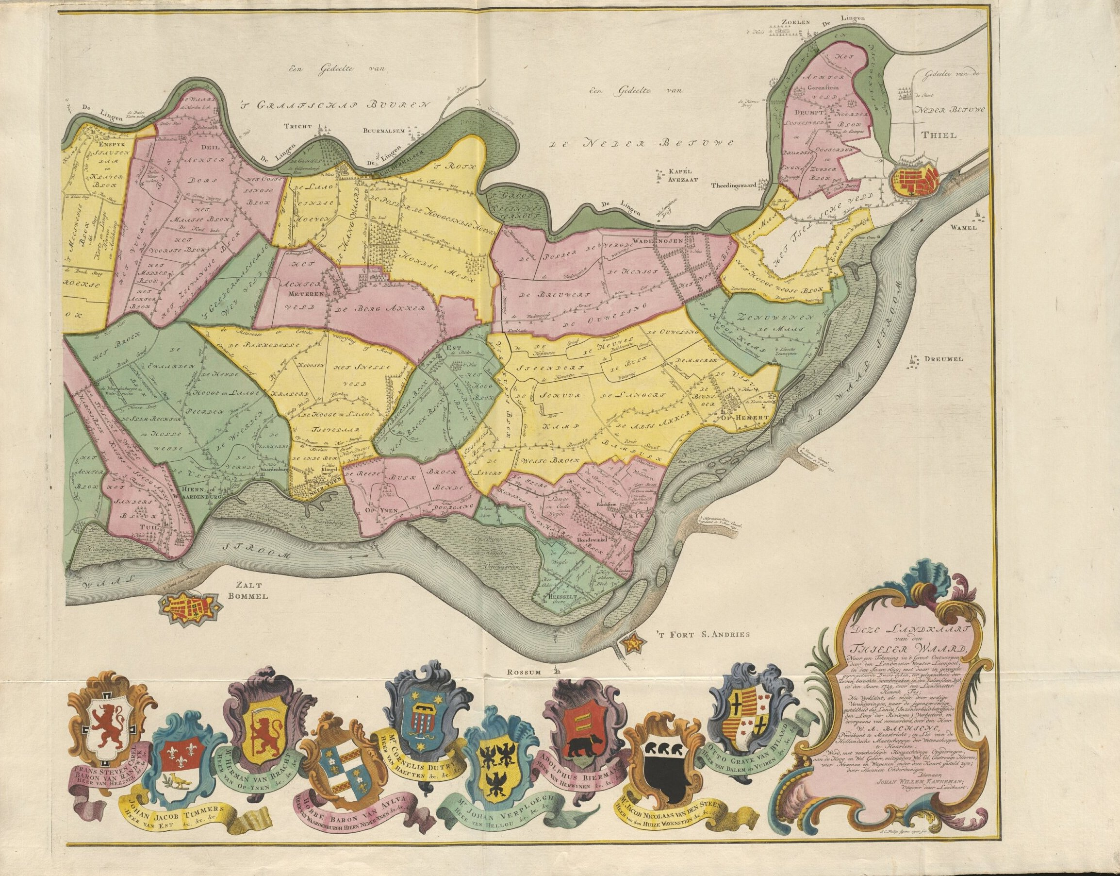 Kaart Tielerwaard (1759) naar een tekening uit 1699 van Wouter Leempoel